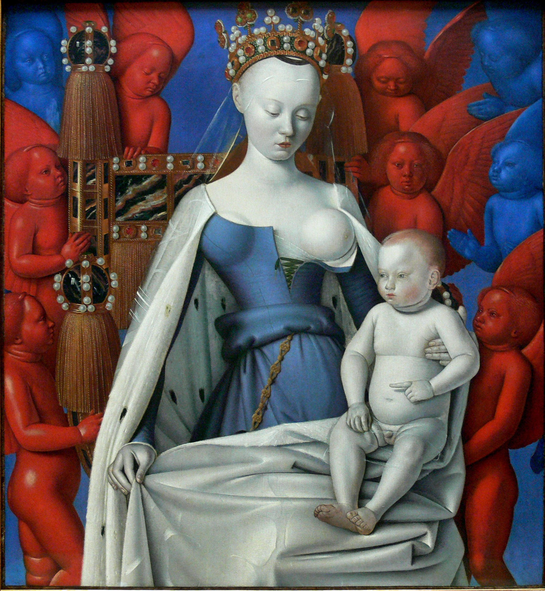 Madonna lactans (with frame)